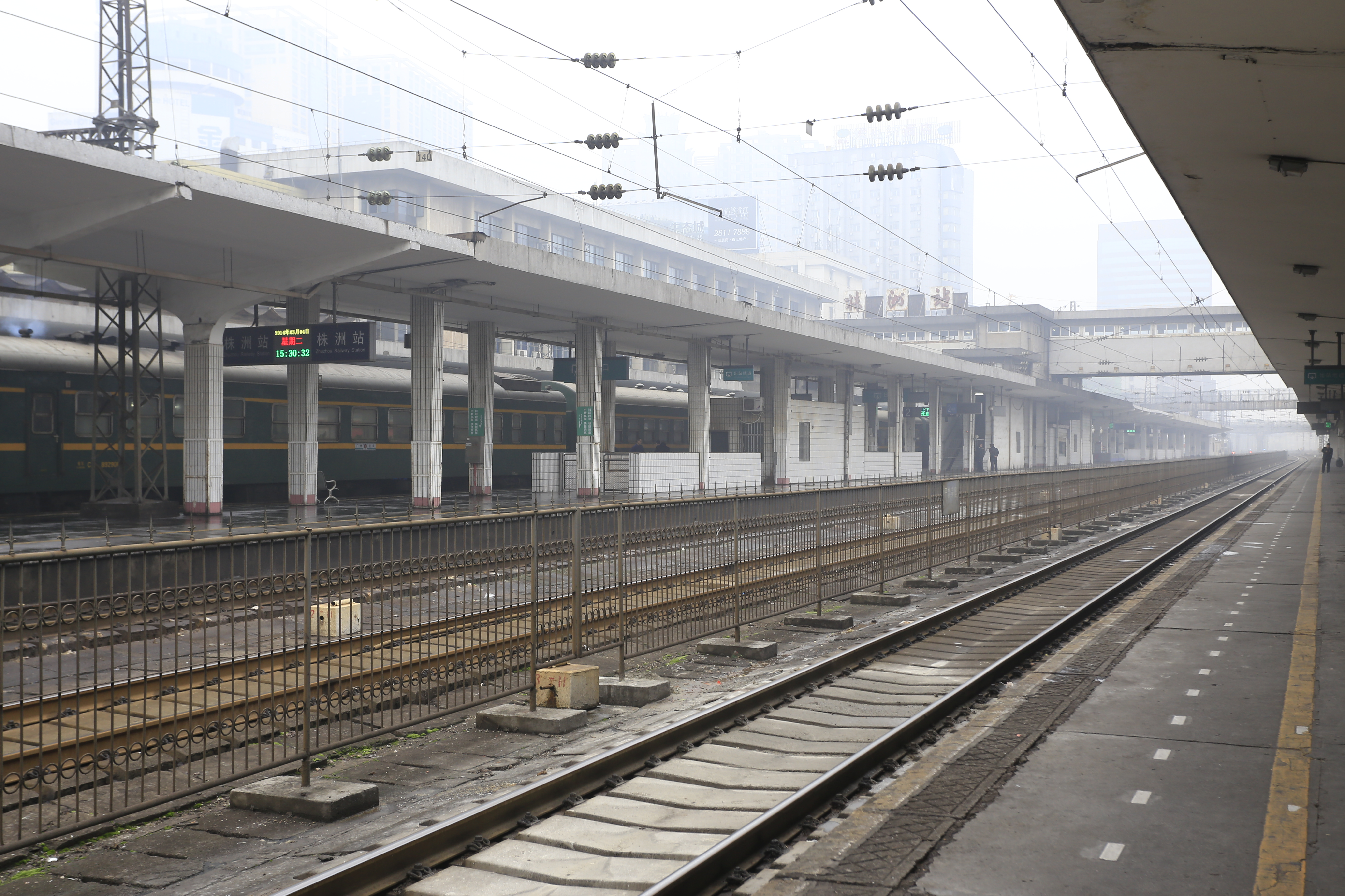 株洲站